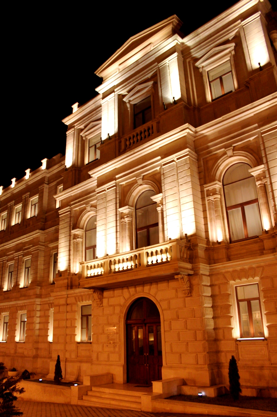 Бакинский музей искусства